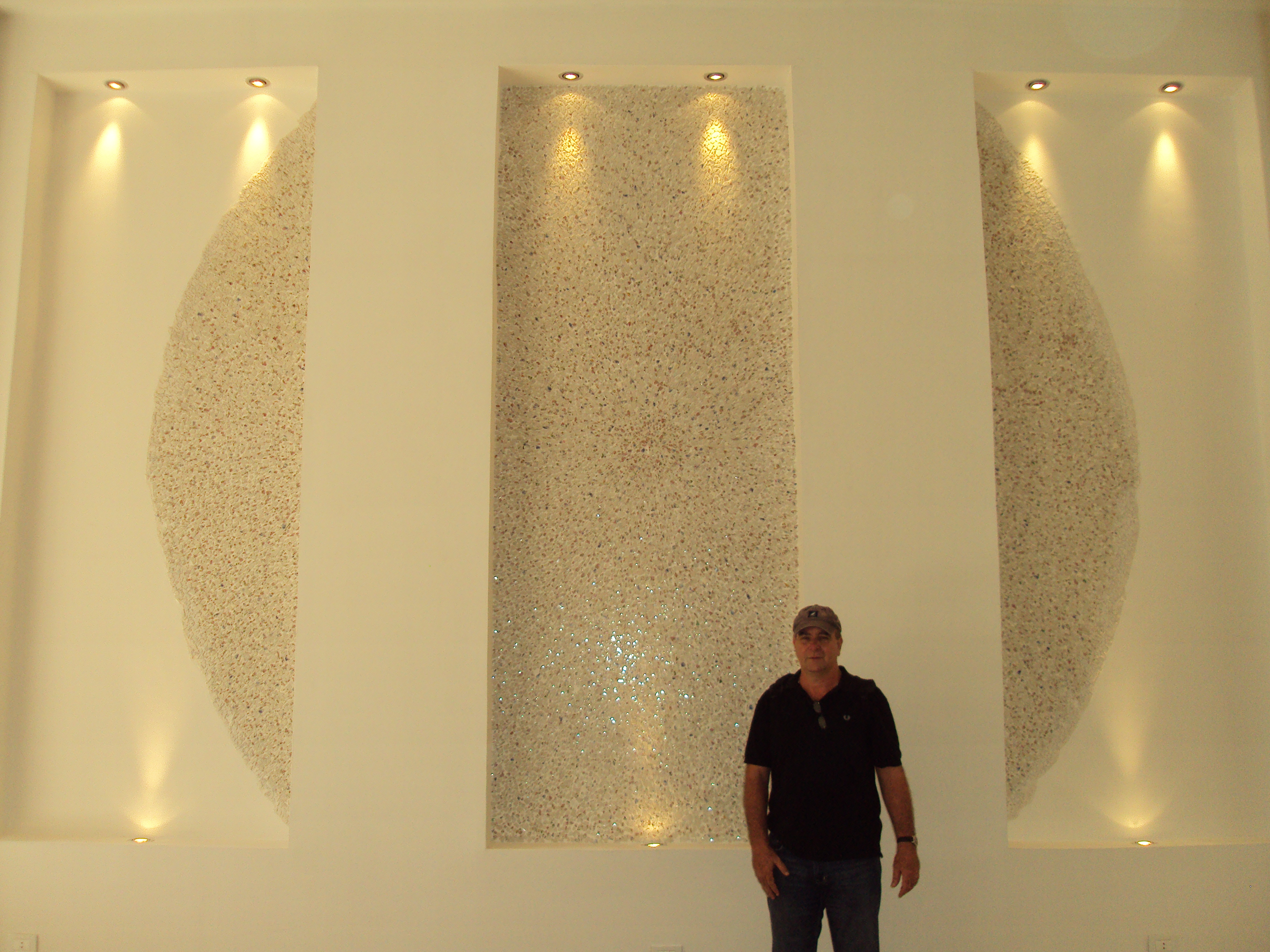 Jose Manuel Fors delante de una de sus obras más recientes en La Habana (Cuba)